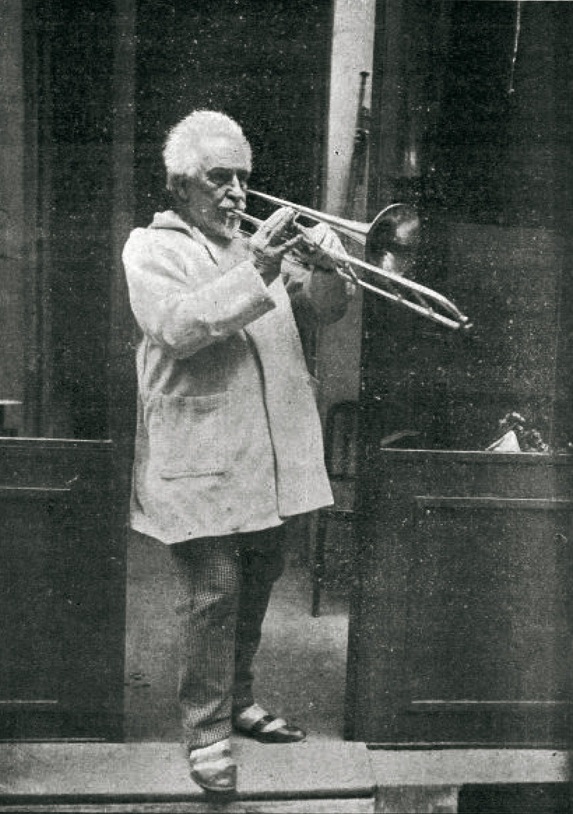 Photographie dans La Chronique médicale, n° 20.